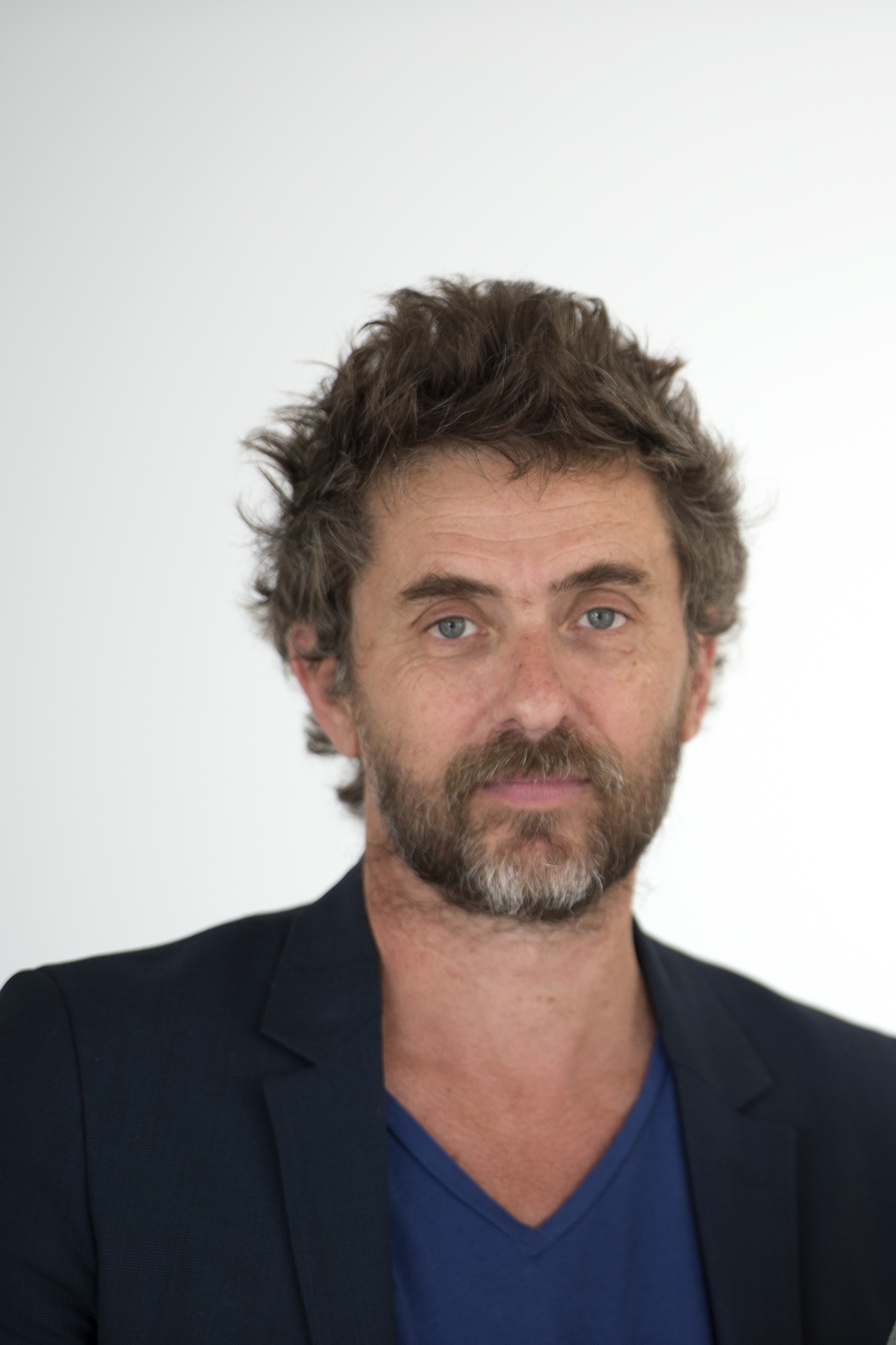 portrait Pascal Rambert (crédit:Marc Domage)